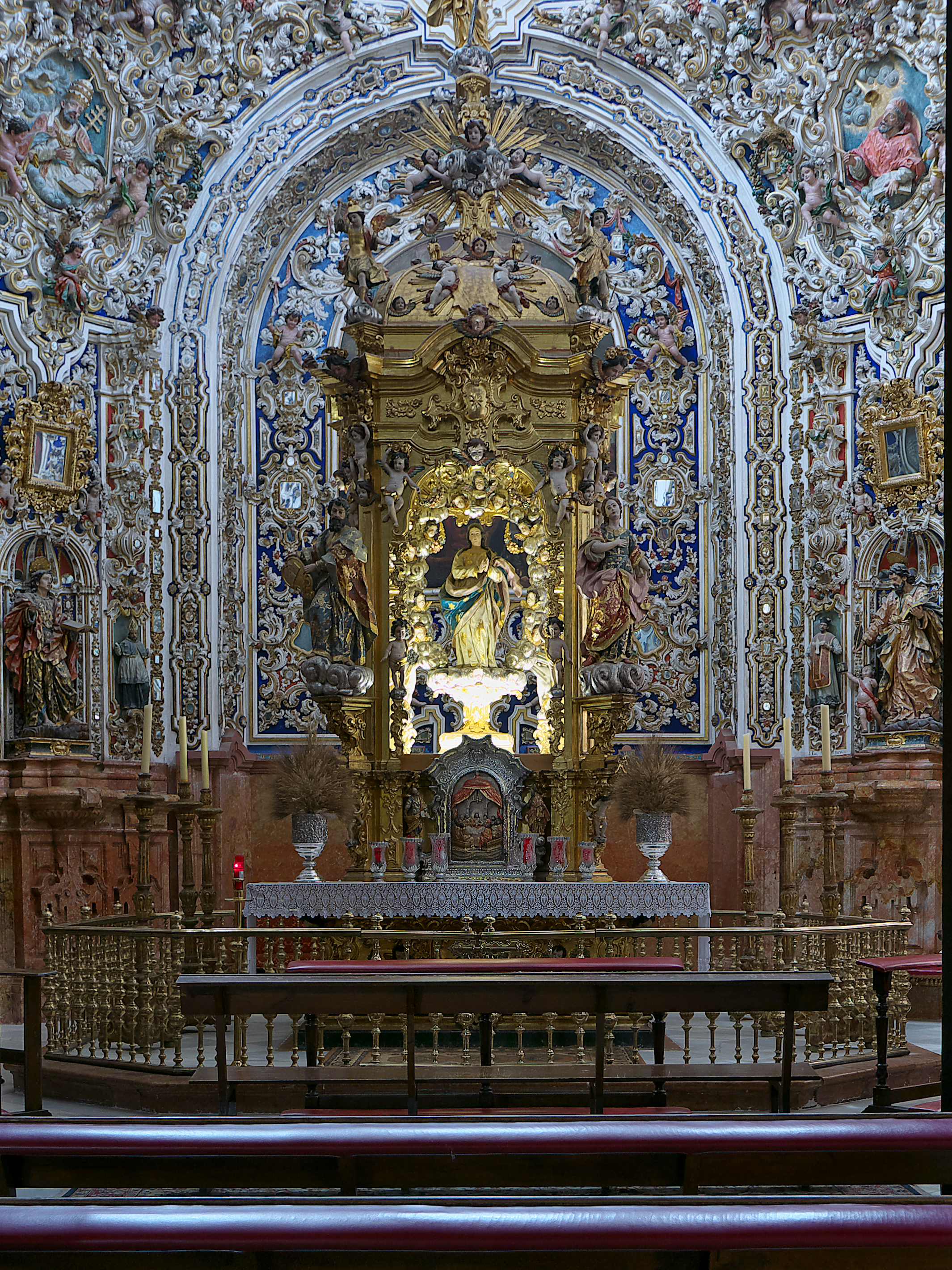 Capilla del Sagrario (1740-1772), Iglesia de San Mateo (Lucena). La obra cumbre de Leonardo Antonio de Castro.